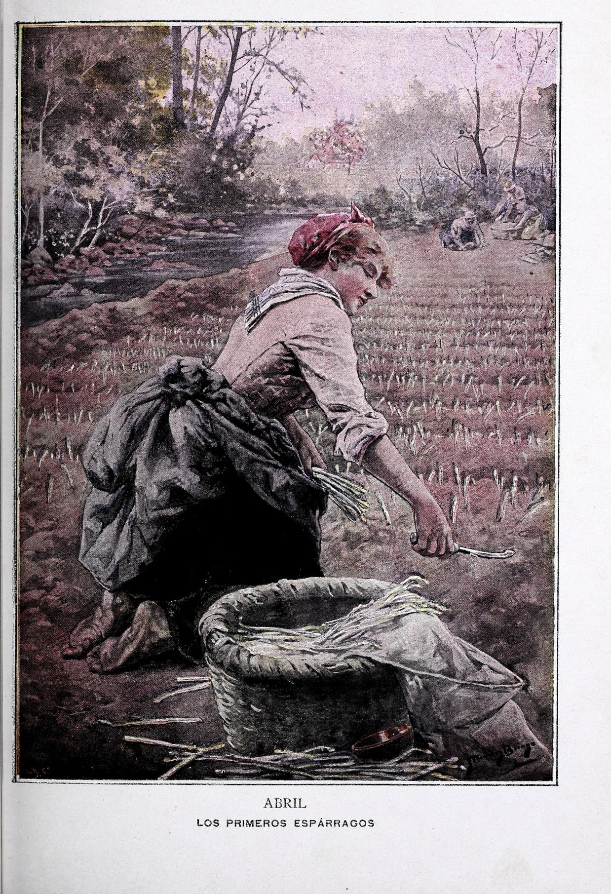 Abril. Los primeros espárragos.